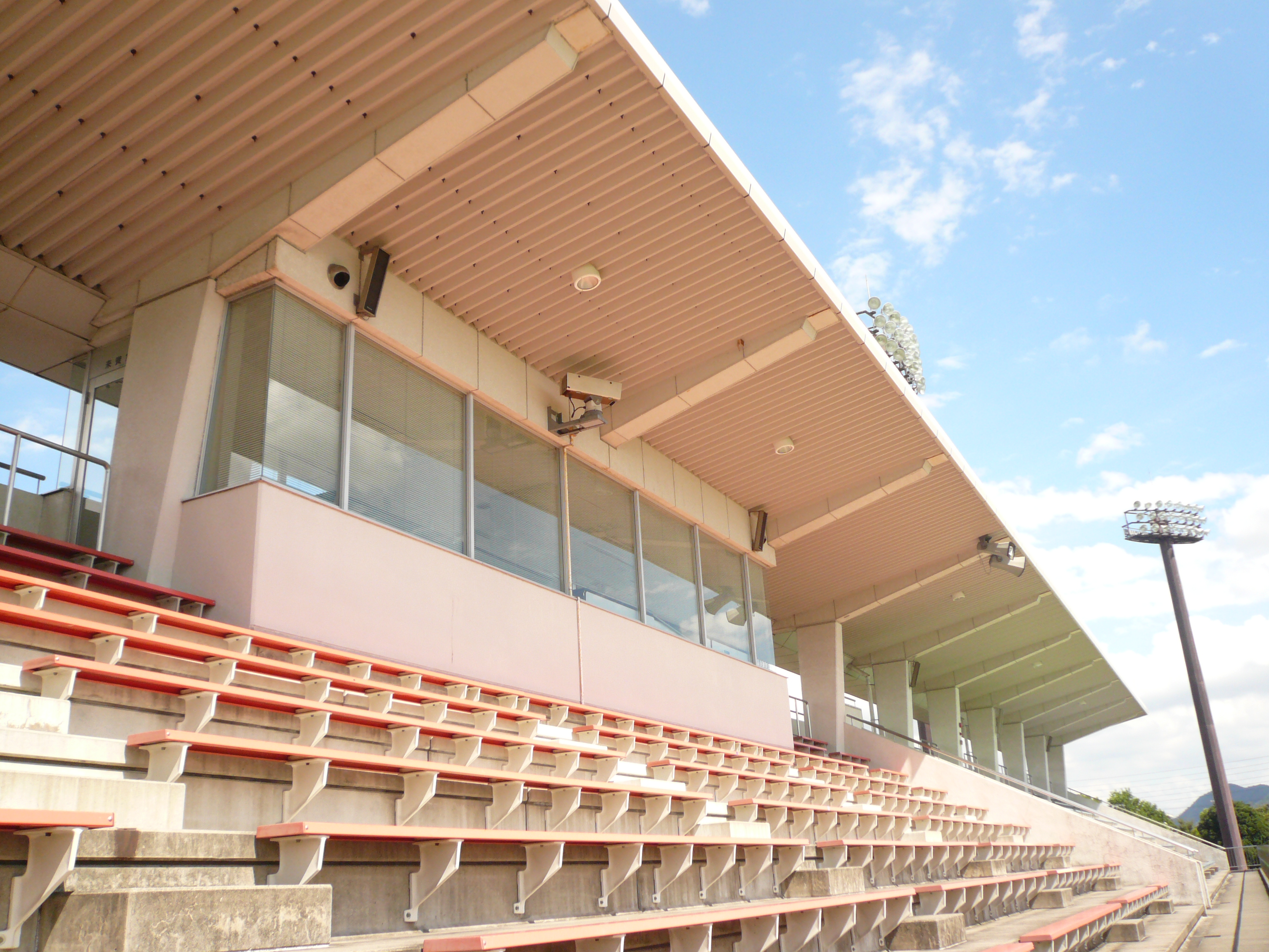 Nagaragawa Ball Field Meadow（長良川球技メドウ）,Gifu,Gifu(岐阜県岐阜市)で撮影。来賓席